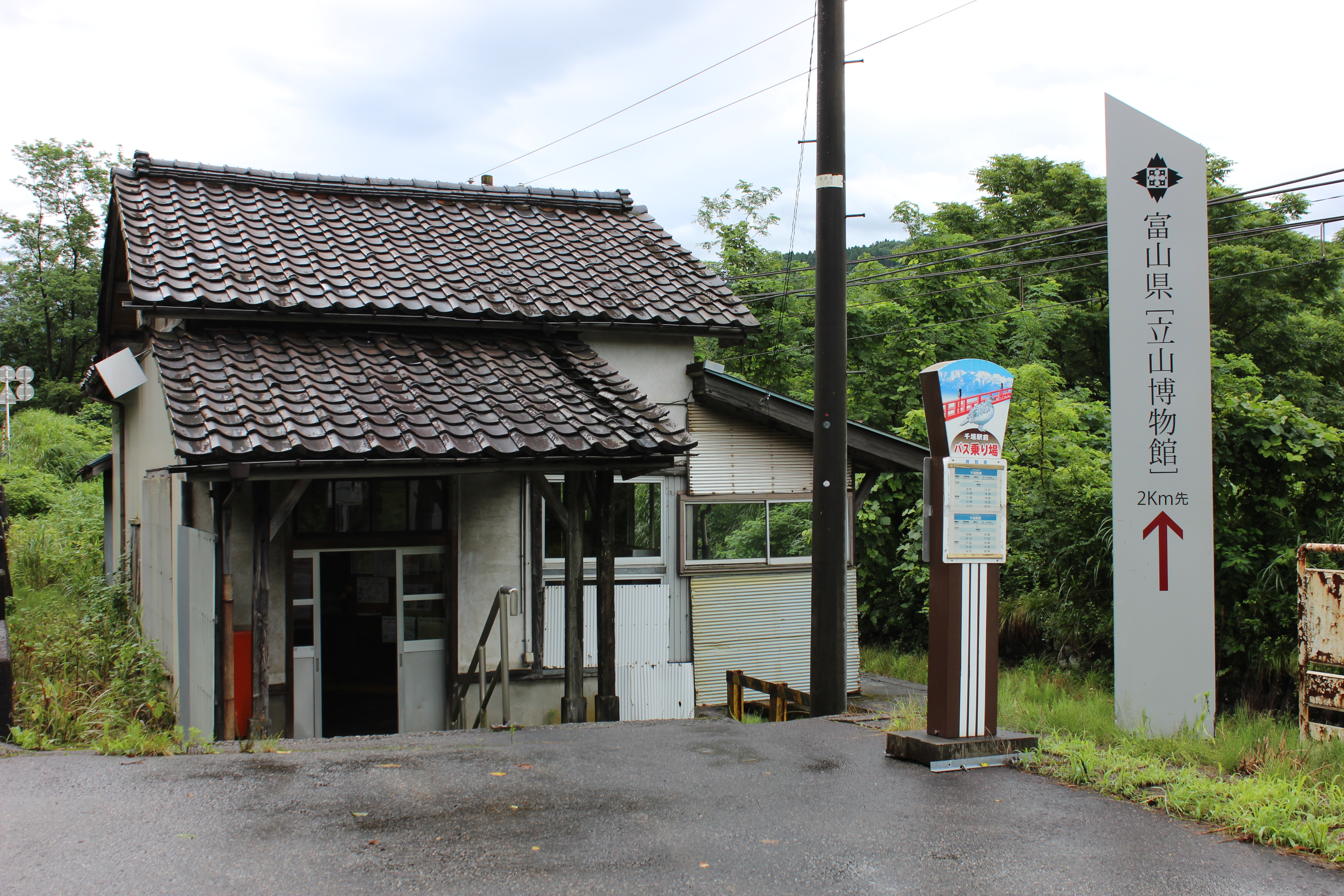 千垣駅（富山県中新川郡立山町）